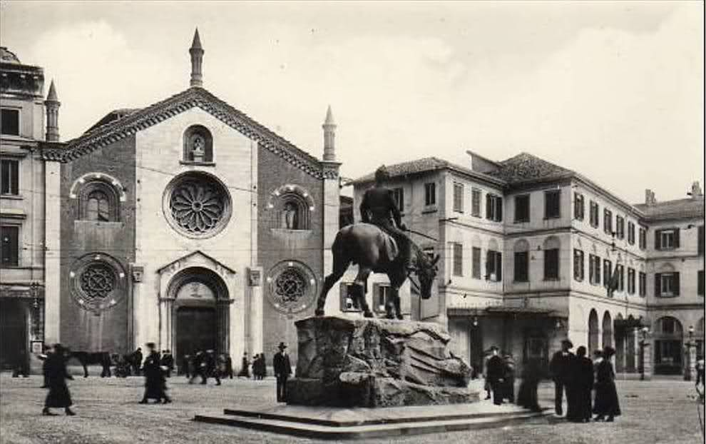 Milano, piazza Missori, all'epoca piazza San Giovanni in Conca, con la basilica di San Giovanni in Conca prima degli sventramenti avvenuti tra il 1948 e il 1952